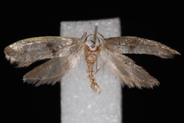 Swammerdamia caesiella